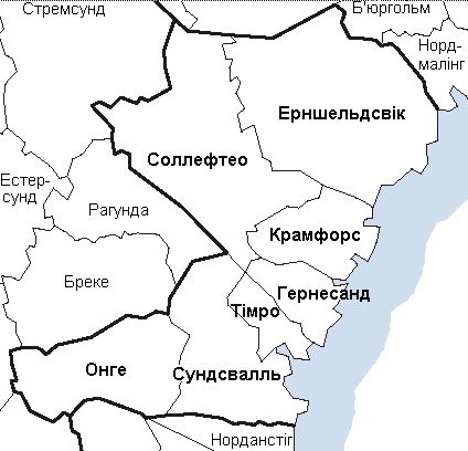 Карта адміністративного поділу лену Вестерноррланд у Швеції. Карту створено на основі карти File:Västernorrland County.png.